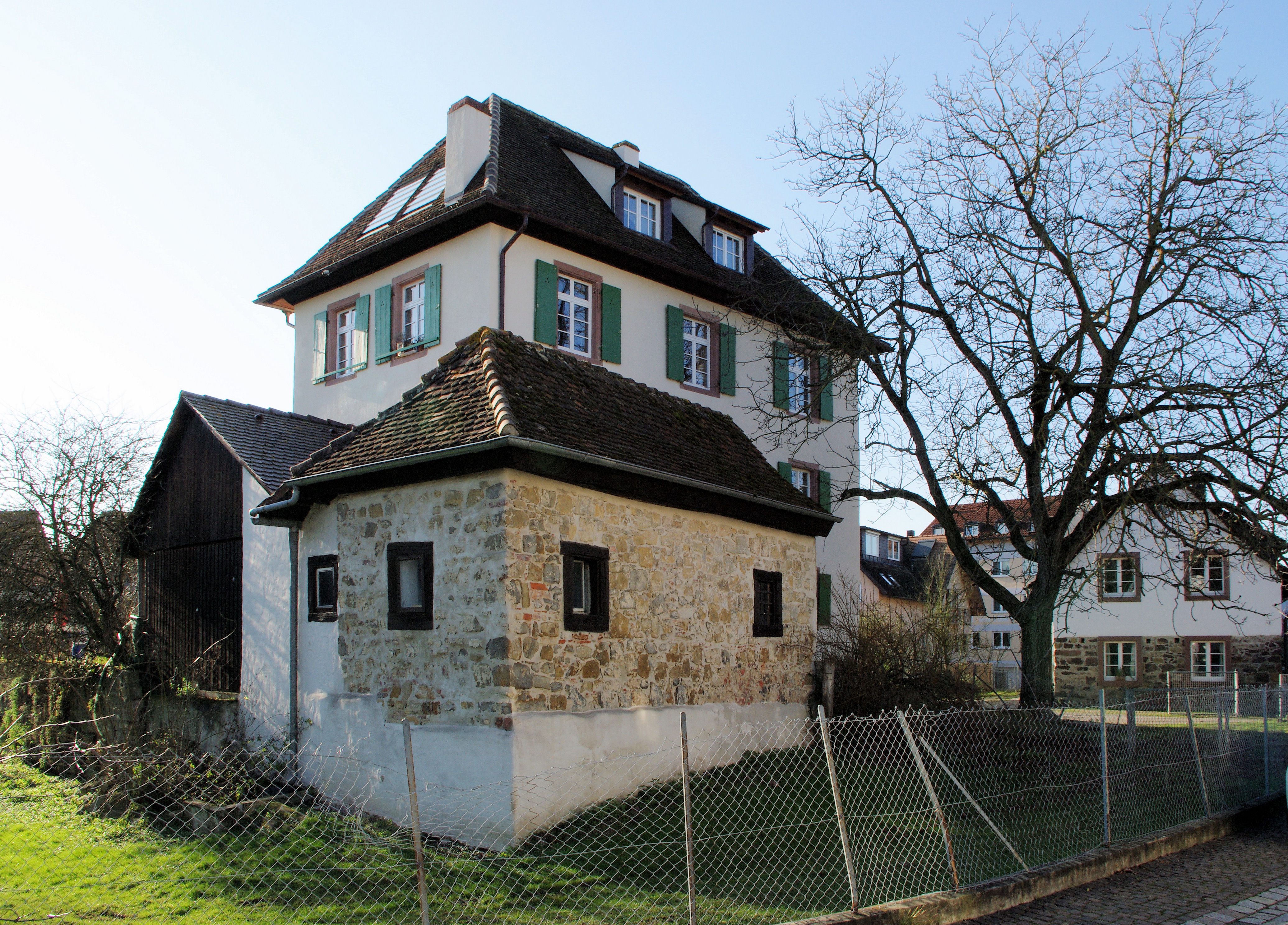 Altes Schloß. Das Alte Schloß zu Lehen sind erstmalig im 13. Jahrhundert erwähnt. In der Zeit vom 16. bis zum 19. Jahrhundert waren sie ein Freiburger Försterhaus. Auch diese Gebäude stehen noch und sind bewohnt. Dieser „Curtis zu Leheim“ war ein befestigter Herrenhof. Die Befestigung bestand in der Anlage als Tief- bzw. Wasserburg. Das Wasser eines Dreisamarms umfloss das Herrenhaus, welches wahrscheinlich auf einer kleinen Insel als Ausläufer des Lehener Bergles stand. Der Zugang zu dieser Anlage, die mit einer geschlossenen Mauer umgeben war, erfolgte über eine Brücke an der Nordseite.